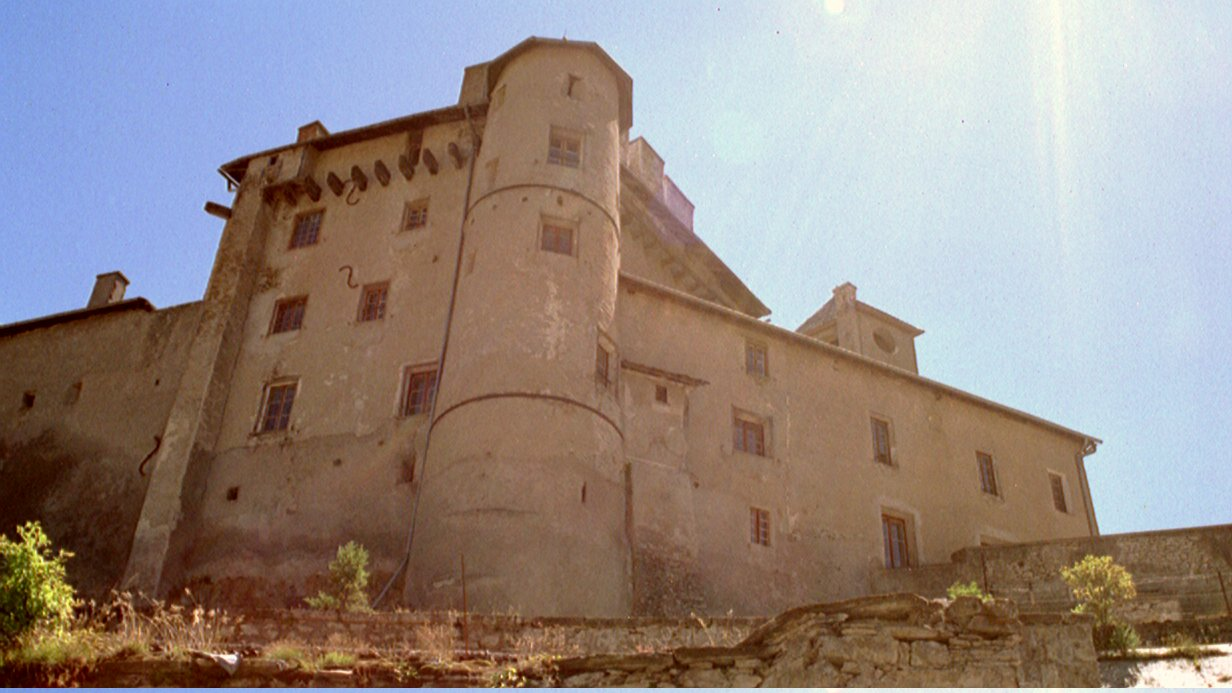 Fort Queyras, in het dal van de rivier de Guille in de Franse Haute Alpes.